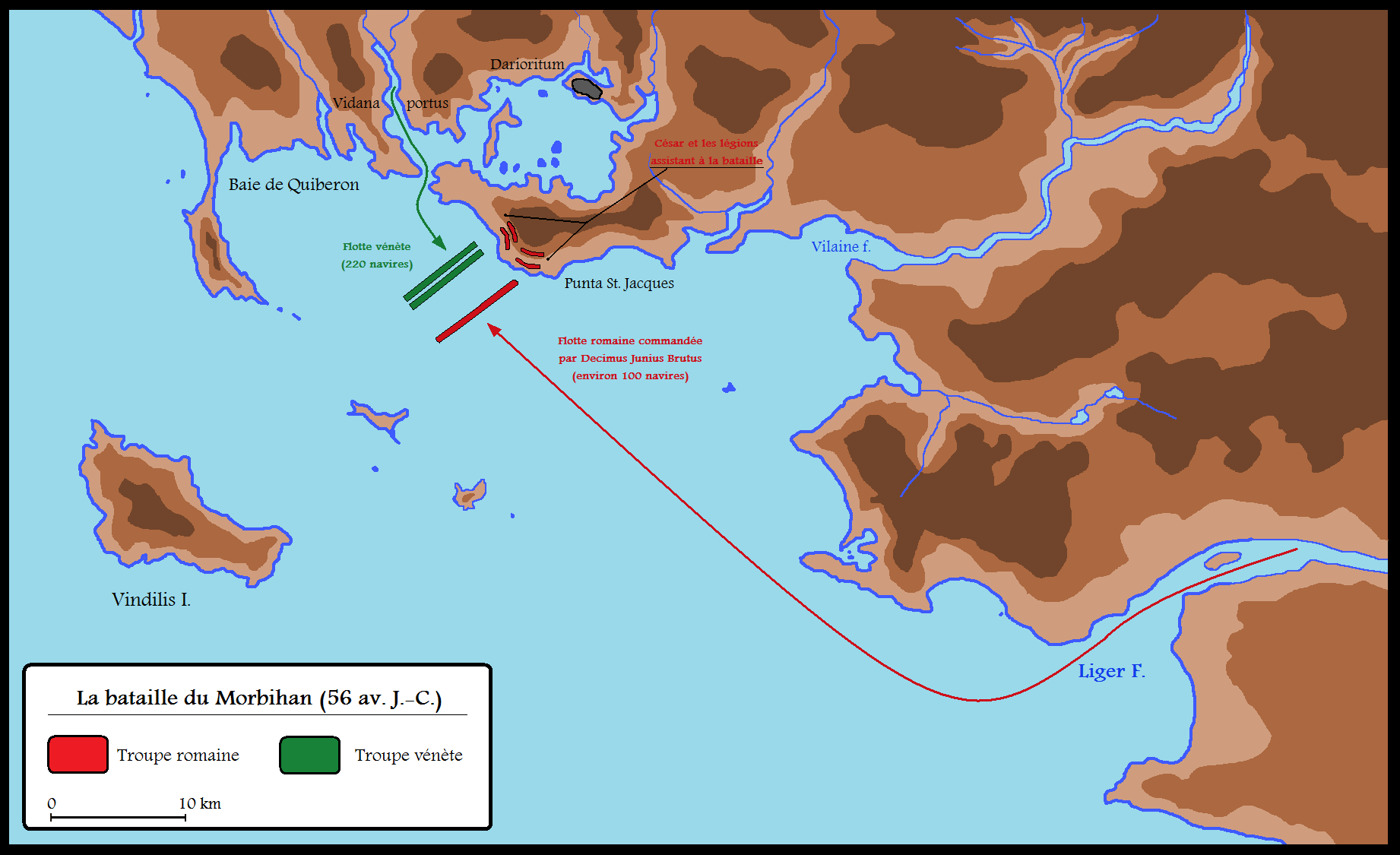 Plan de la bataille navale du Morbihan opposant le lieutenant de César Decimus Brutus à une flotte vénète en 56 av. J.-C.